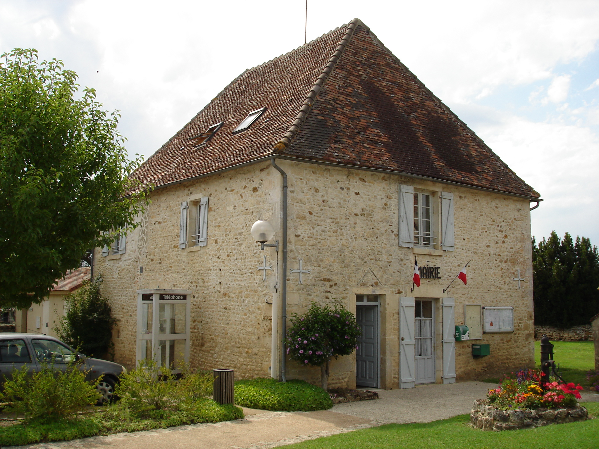 Mauvières (36) : La mairie.